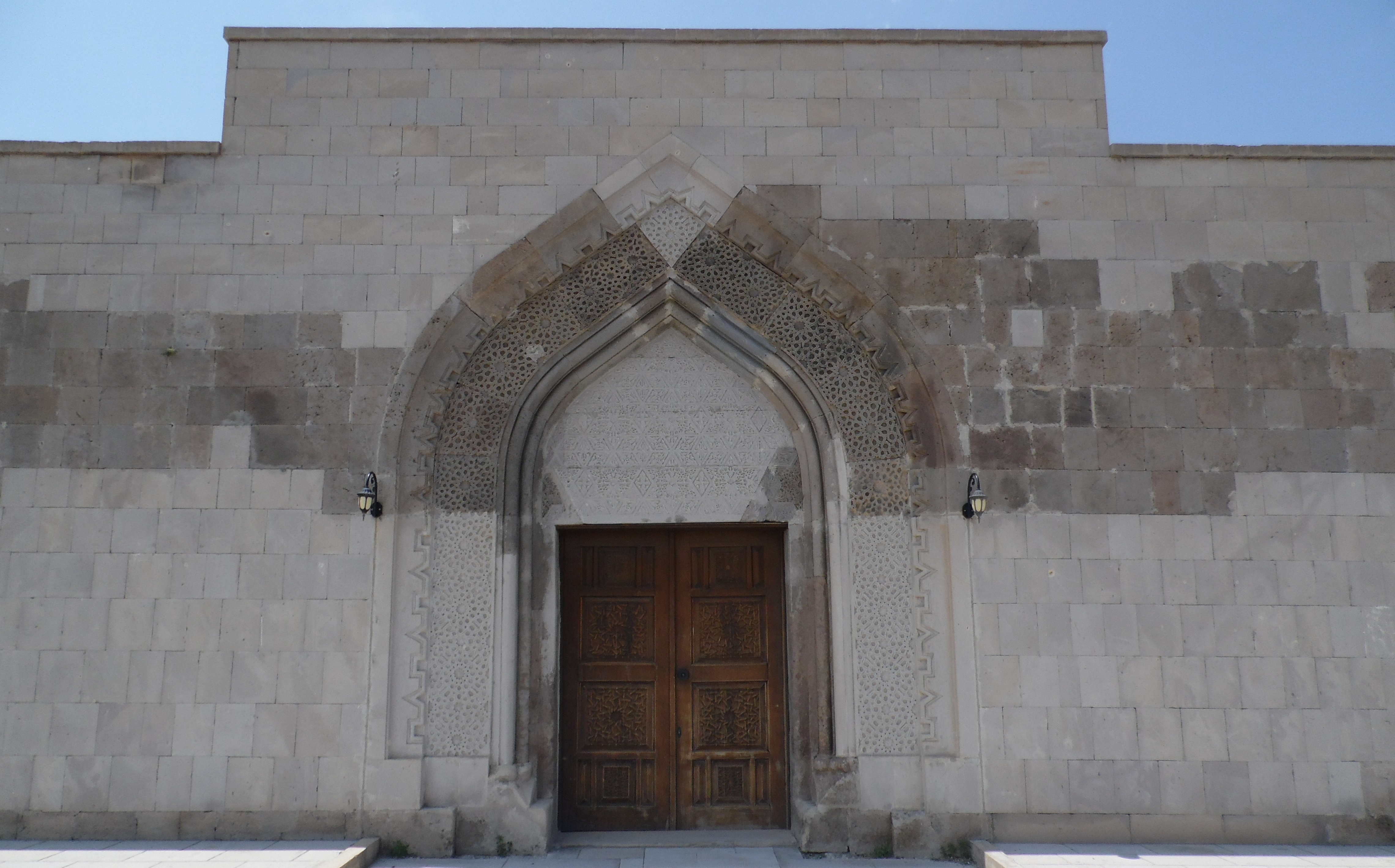 kervansaray ığdır